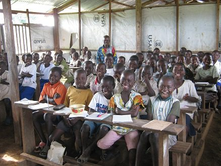 Enfants scolarisés par "Objectif Brousse", association soutenue par le Fonds de Dotation Soeur Marguerite